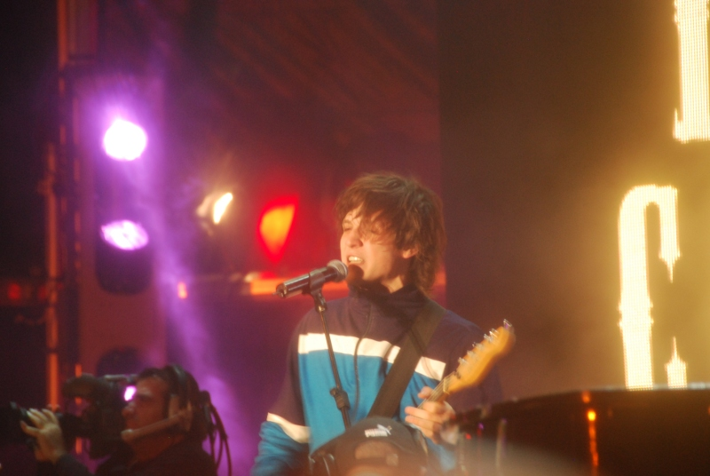 Jacopo Broseghini dei Bastard Sons of Dioniso al concerto di X Factor a Trento.